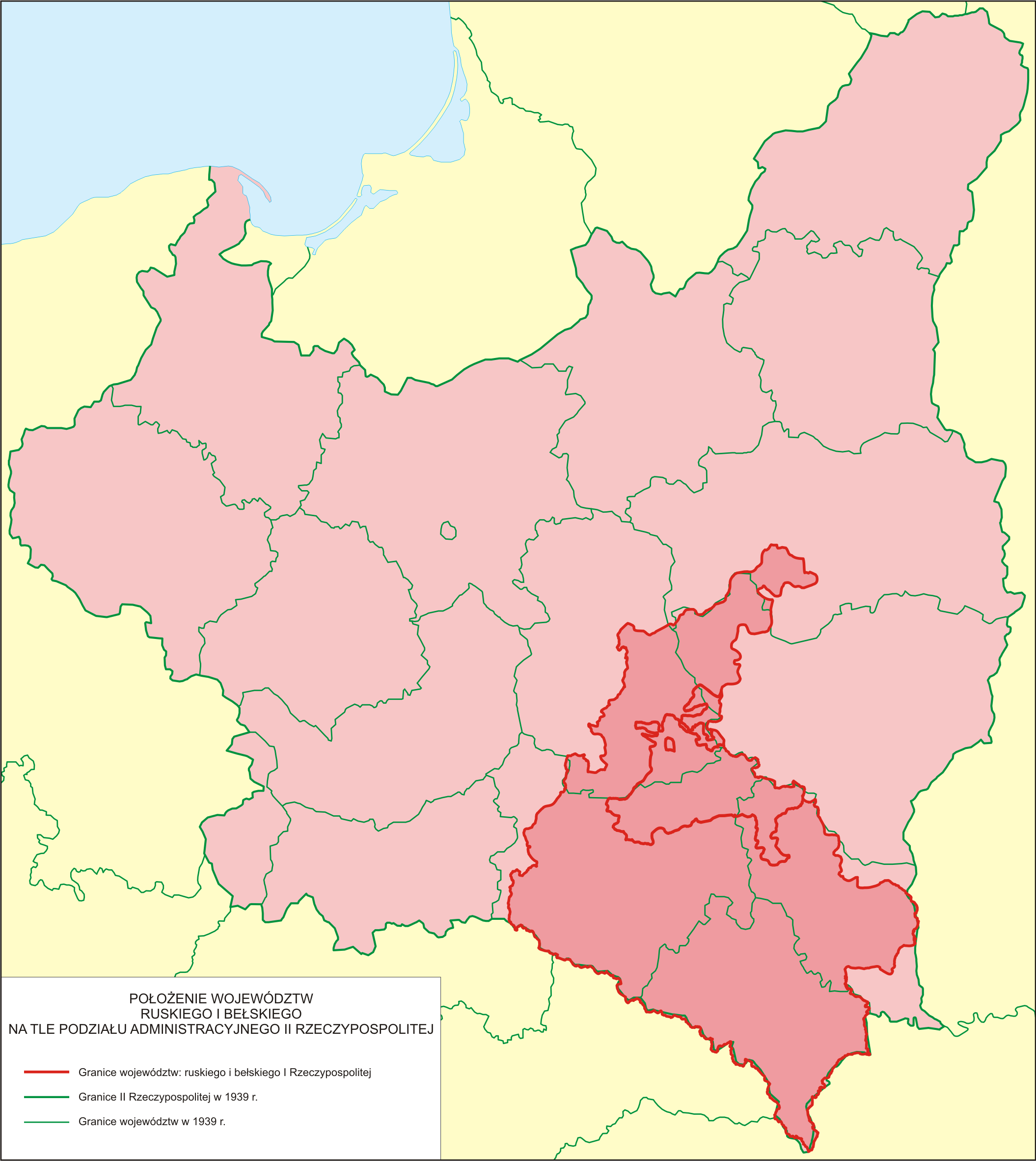 Położenie województw ruskiego i bełskiego I Rzeczypospolitej na tle podziału administracyjnego II Rzeczypospolitej w 1939 r.